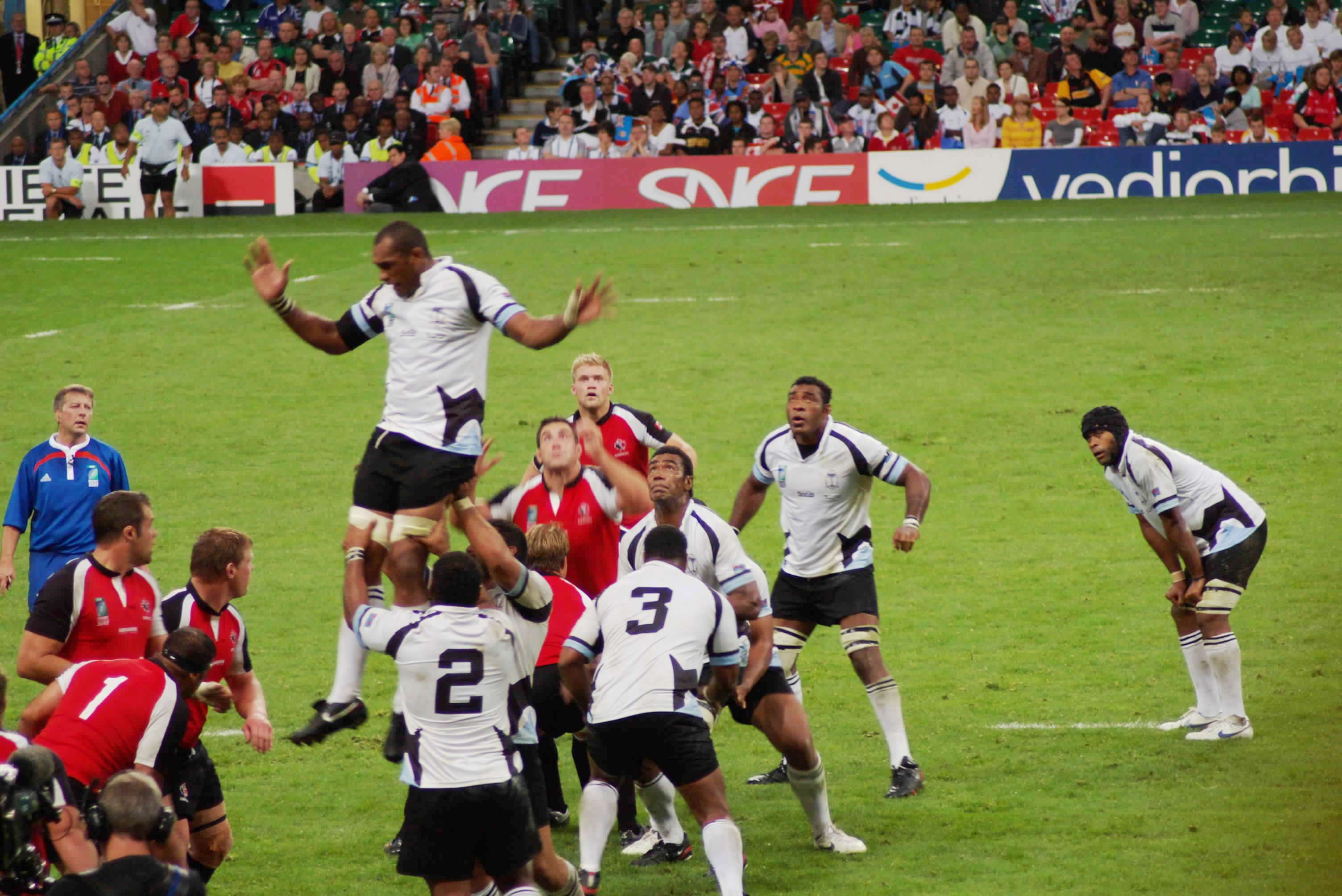 RWC 2007 Canada 16 - 29 Fiji